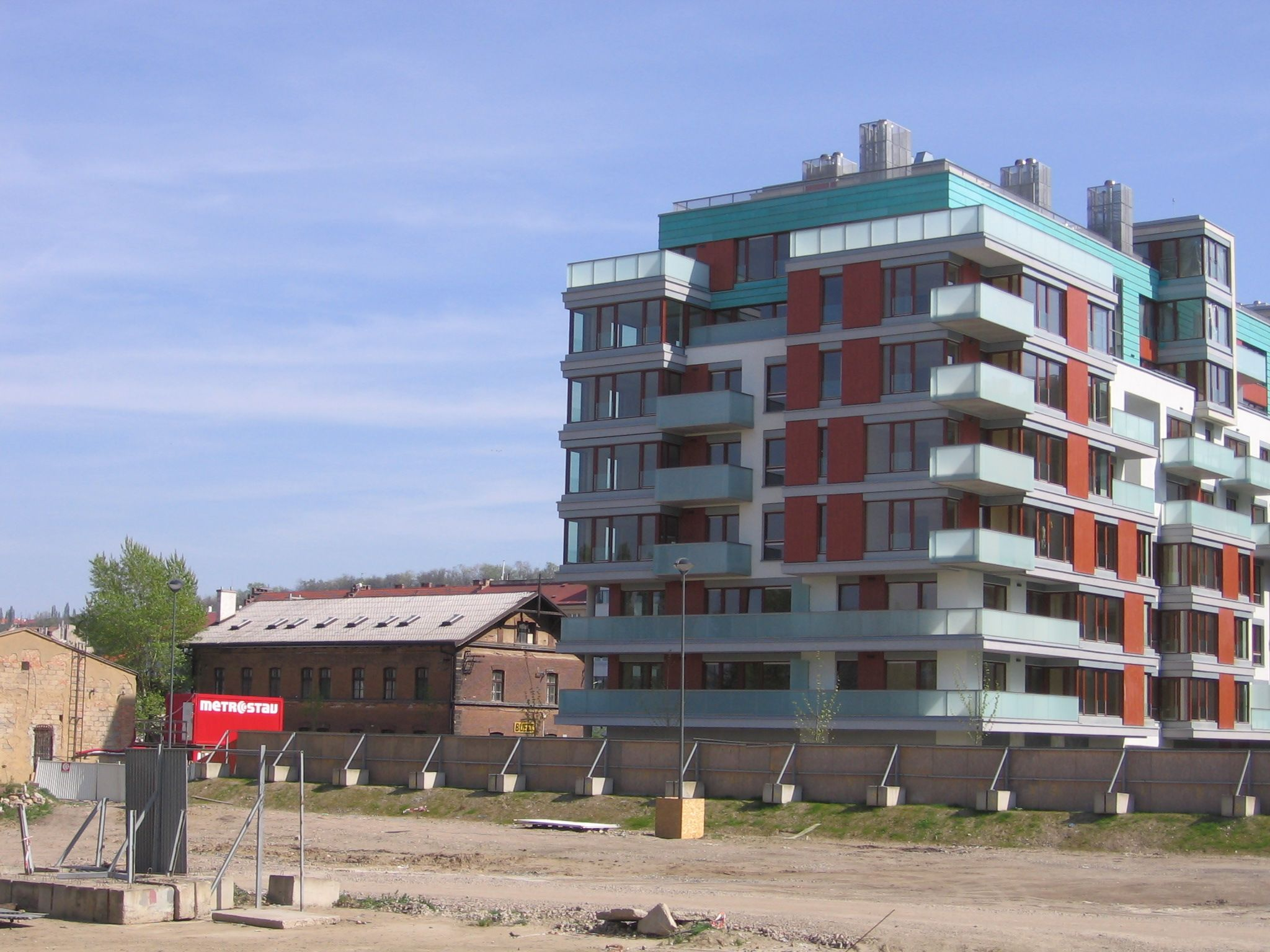 Rohanský ostrov, bývalé nádraží a nová zástavba